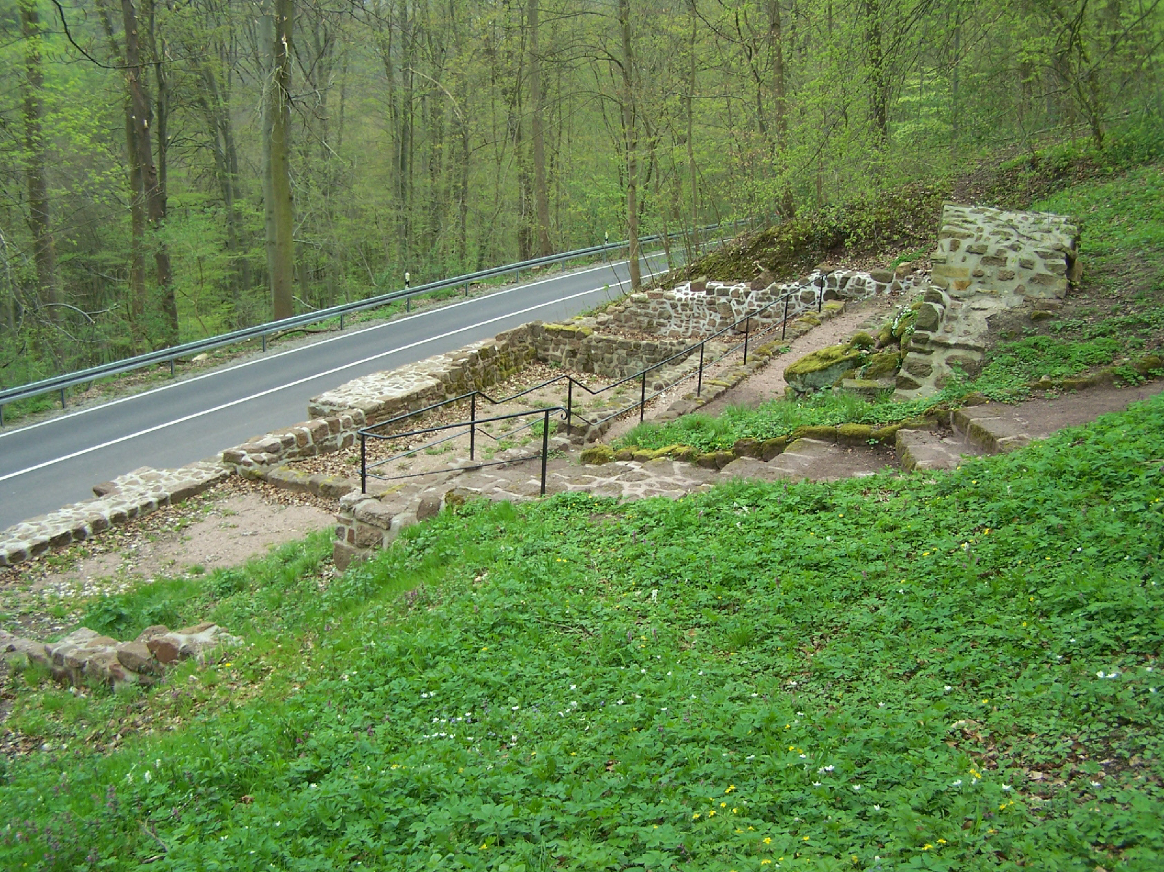 Elisabethhospital